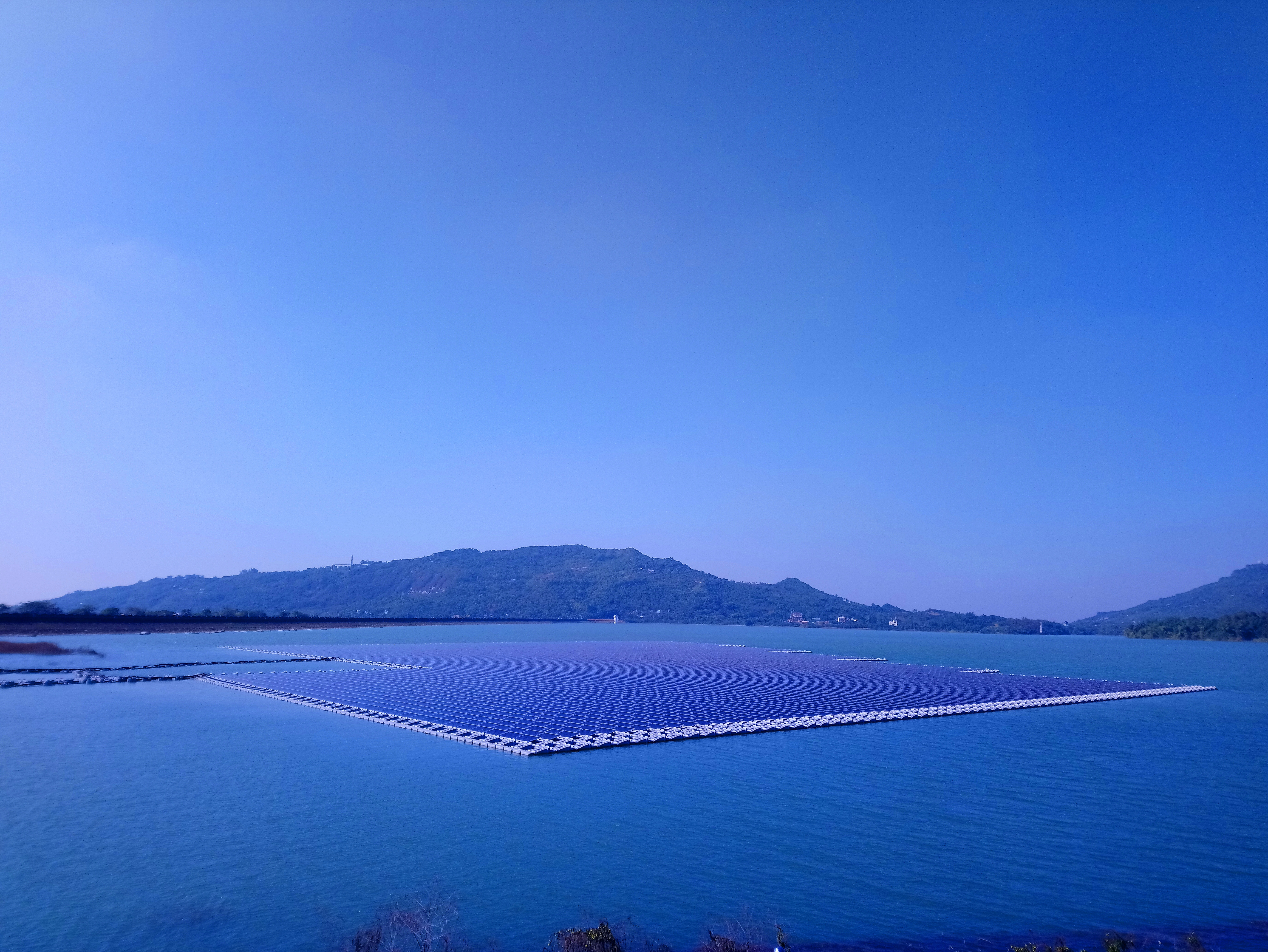 阿公店水庫浮力式太陽能發電系統